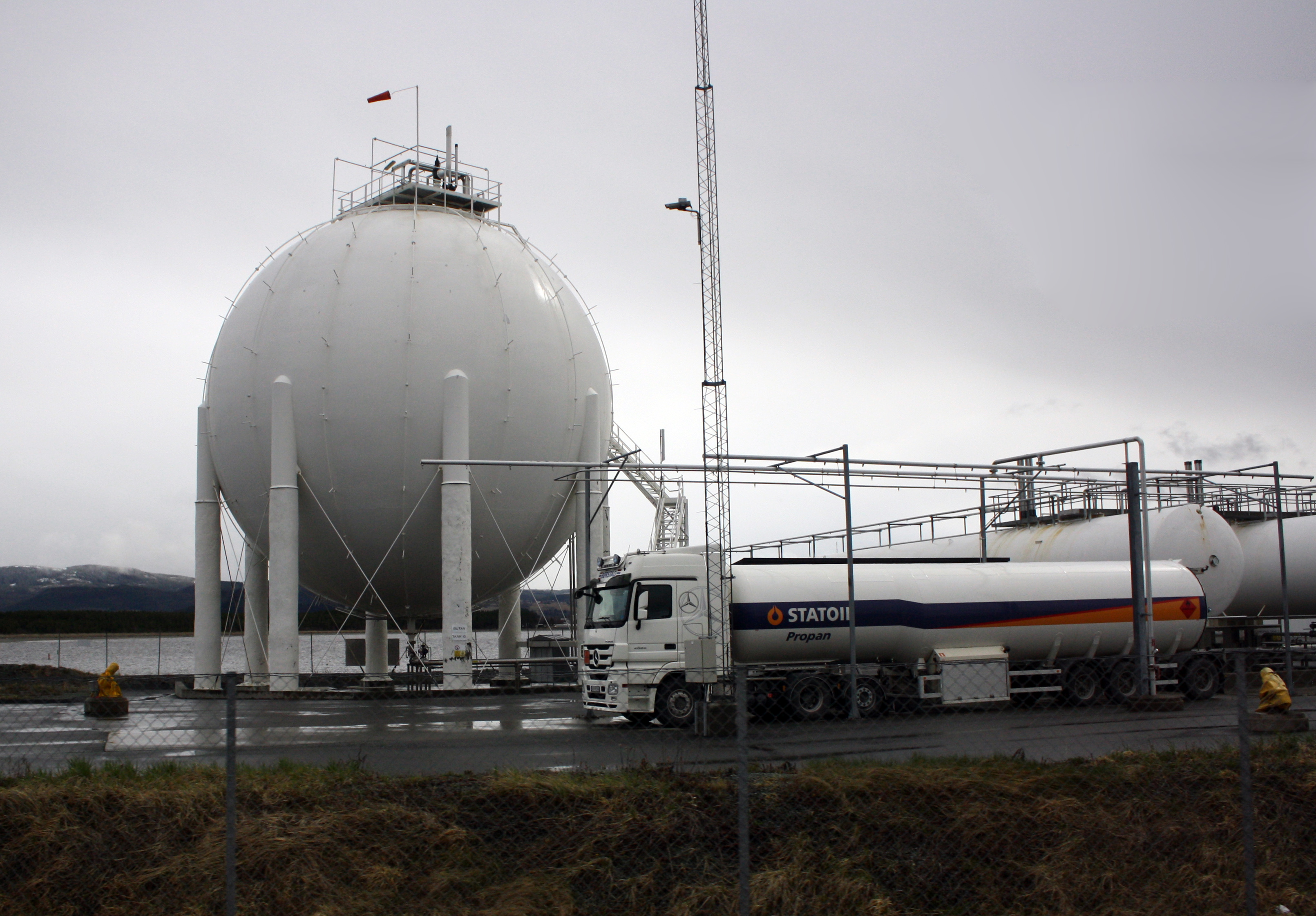 «Gasskula» på Stjørdal havn